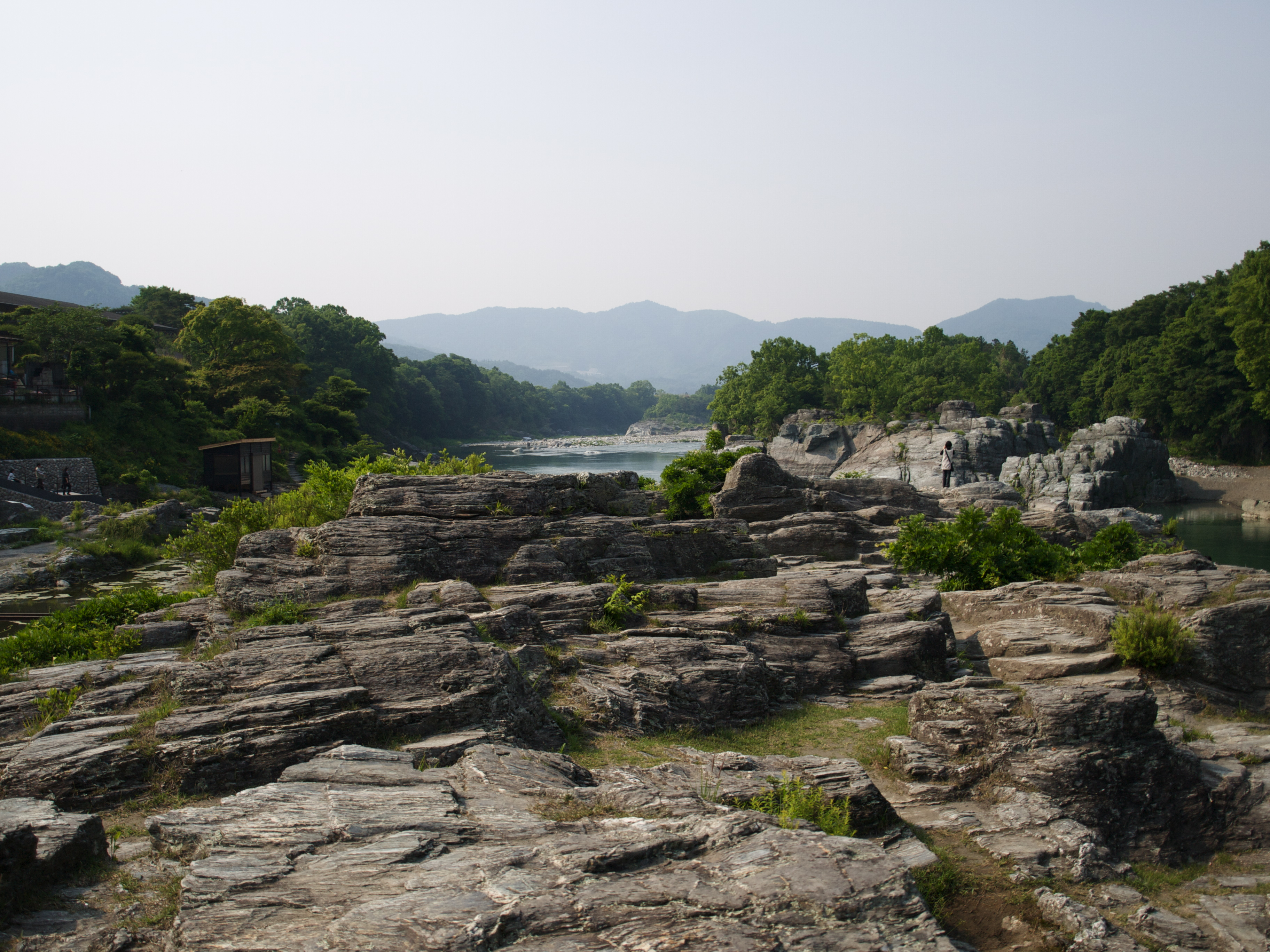 長瀞。 Nagatoro.